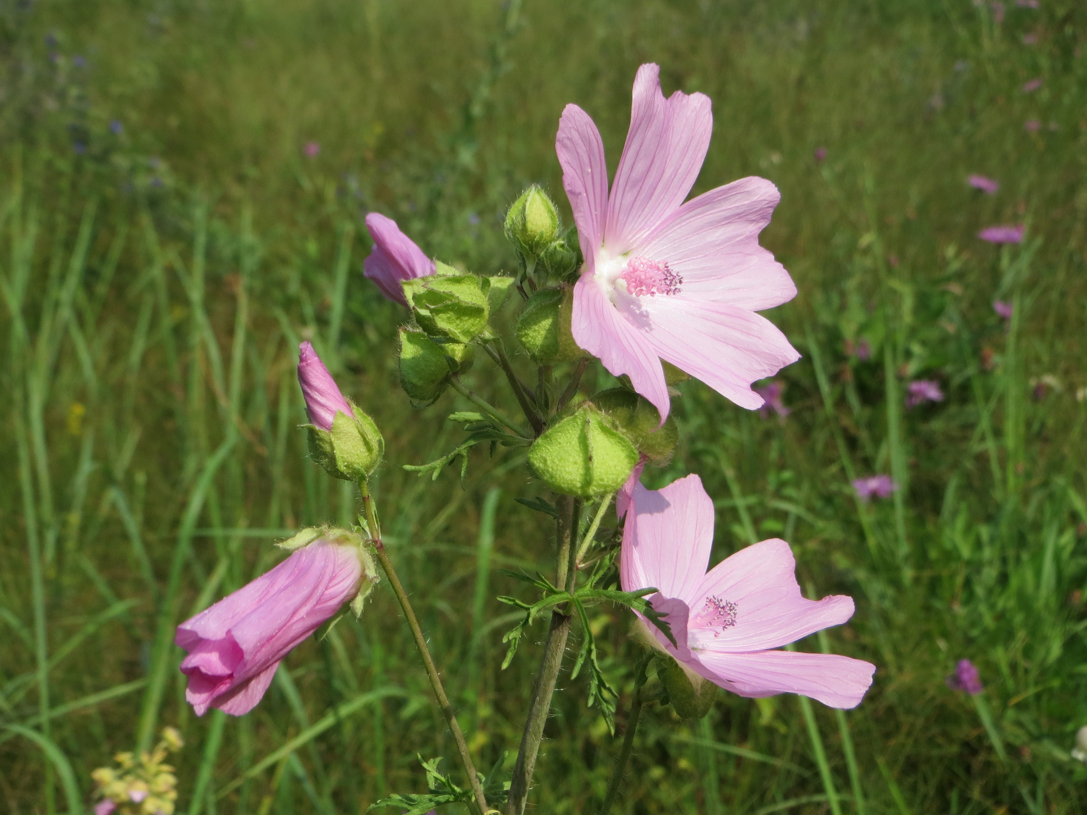 Rosen-Malve (Malva alcea) im Naturschutzgebiet Wagbachniederung